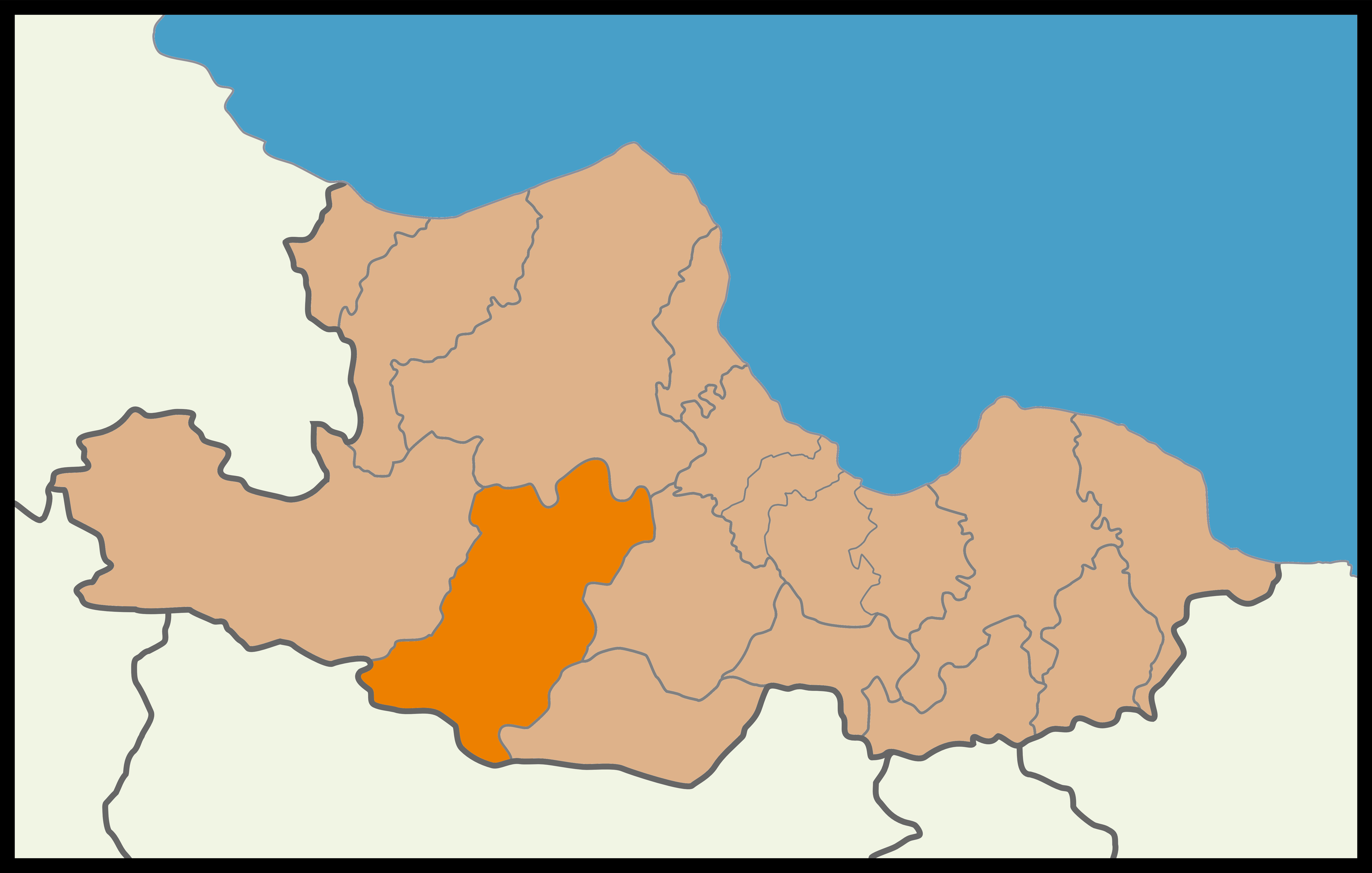 Samsun'un Havza ilçesinin 2015 Türkiye genel seçimleri haritası.